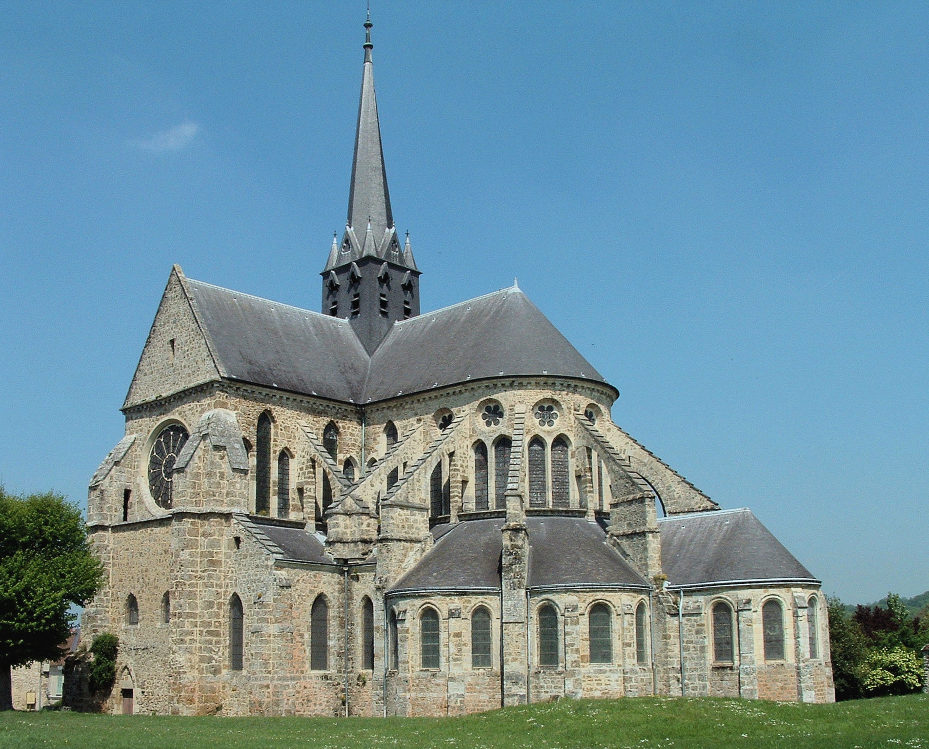 Orbais-l'Abbaye - Abbatiale